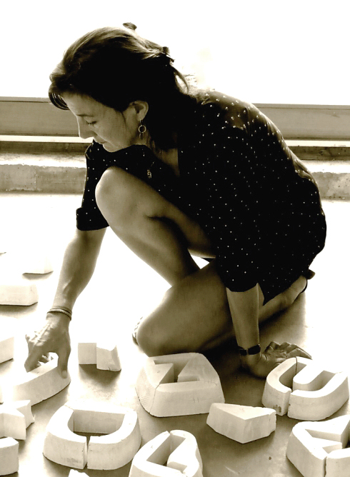 Fotoporträt Agnès Thurnauer mit Matrice/sol